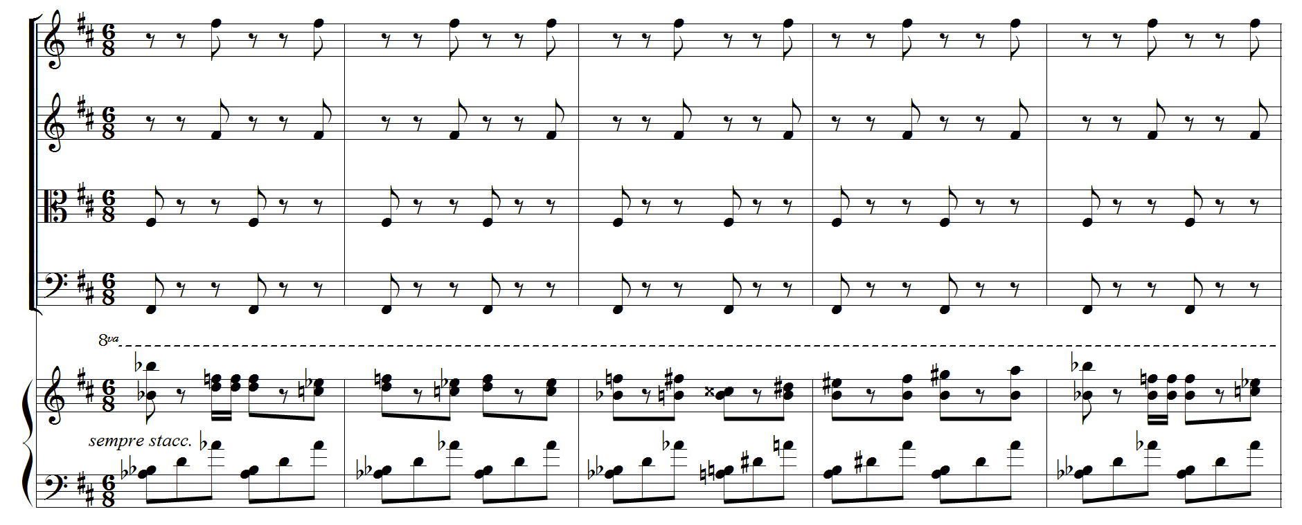 Louis Vierne : Quintette pour piano et cordes, 3e mouvement (n°62 de la partition)